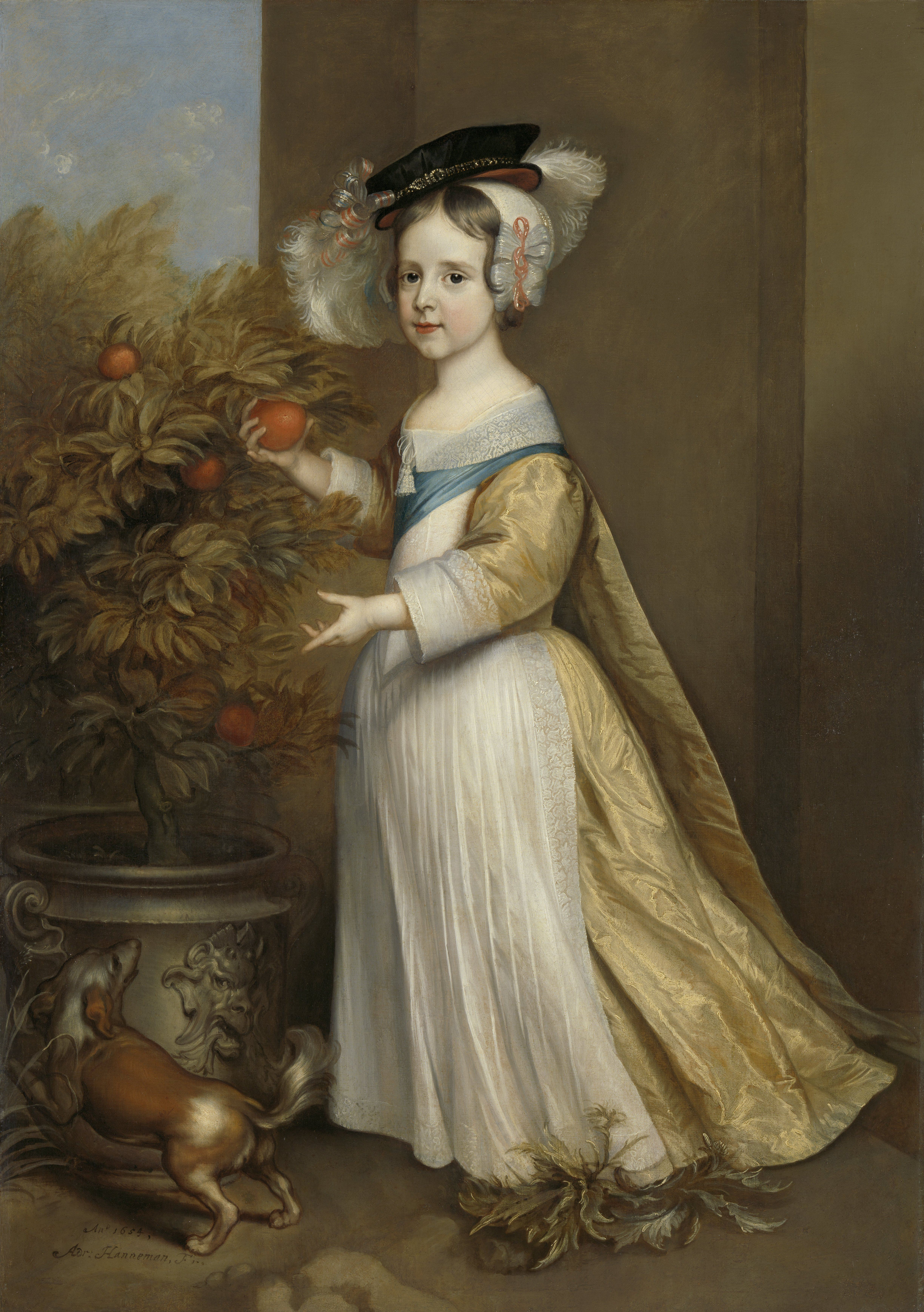 Portret van Willem III, prins van Oranje, als kind. Staand, ten voeten uit, bij een oranjeboom in een pot, met een oranjeappel in de rechterhand. Bij zijn voeten en springend hondje. Op het hoofd een zwarte baret versierd met struisvogelveren en een juwelenband.